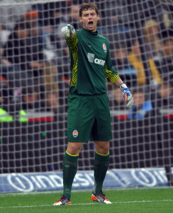 Rybka Portiere dello Shakhtar